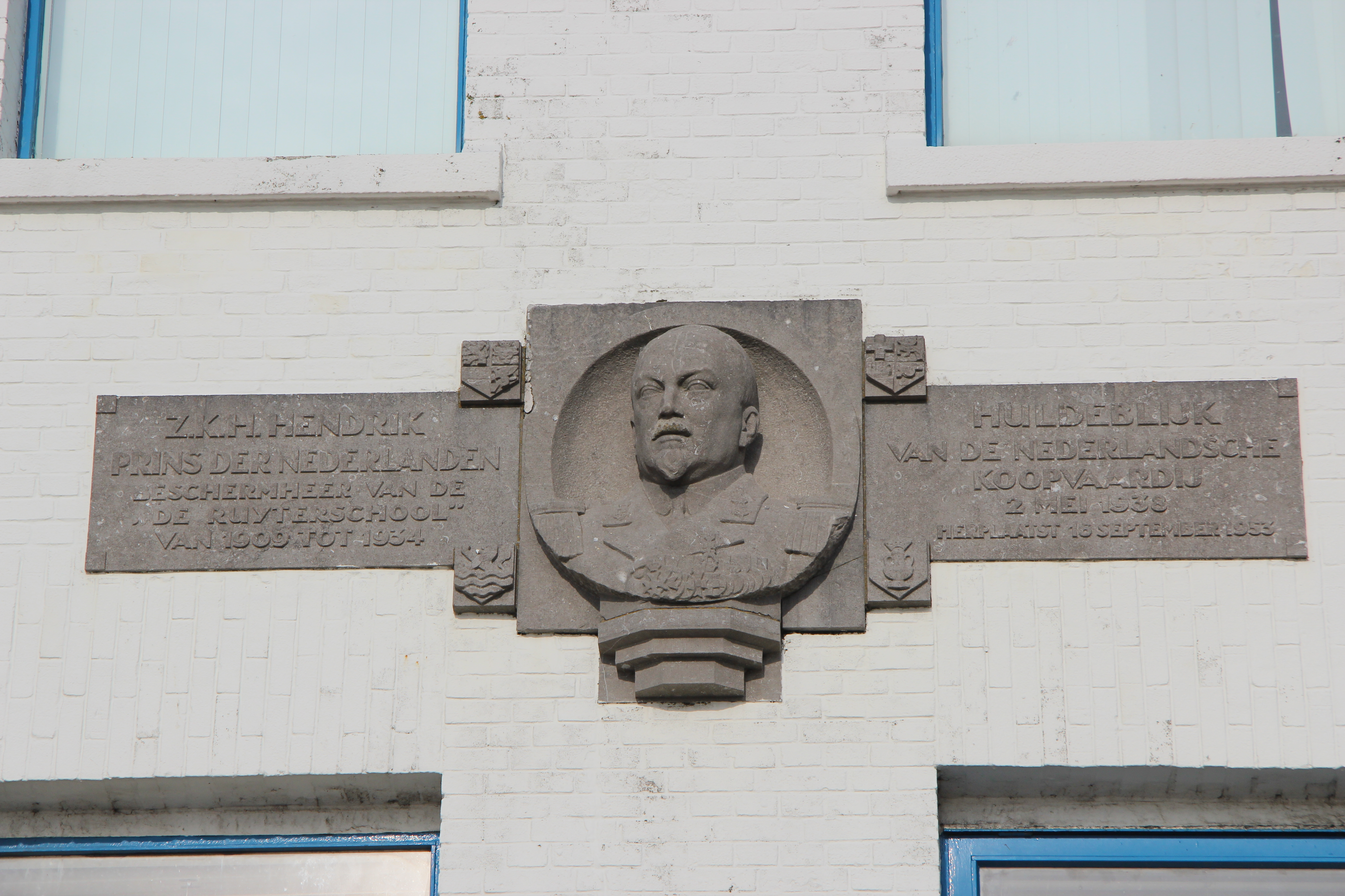 Prins Hendrik - Henk Etienne - 1938